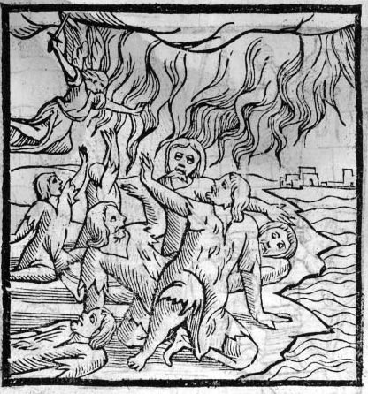 Рисунок из Хроники Перу, 1553